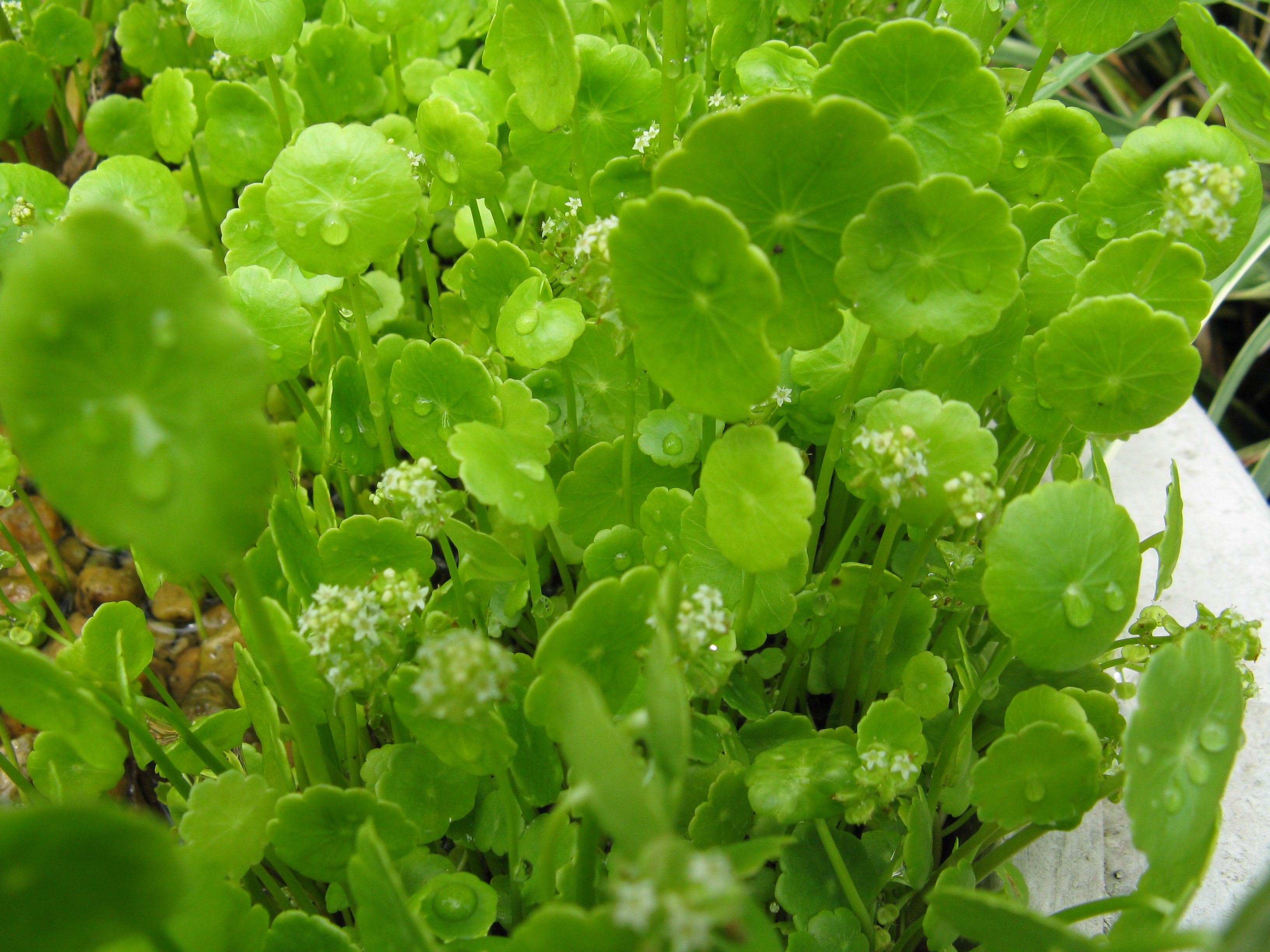 Scientific name Hydrocotyle verticillata var. triradiata